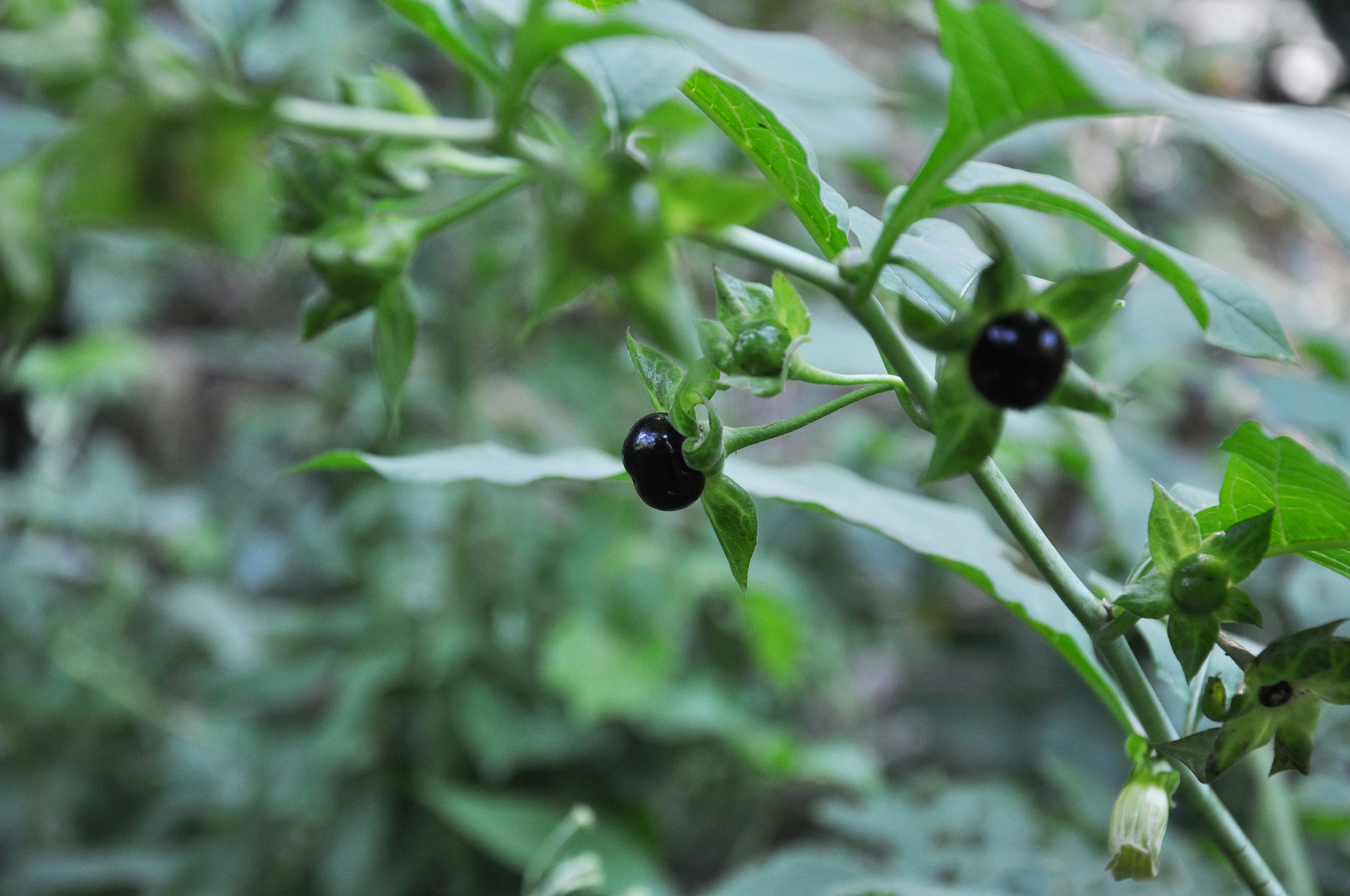 გადაღებულია შოვში Taken in Shovi